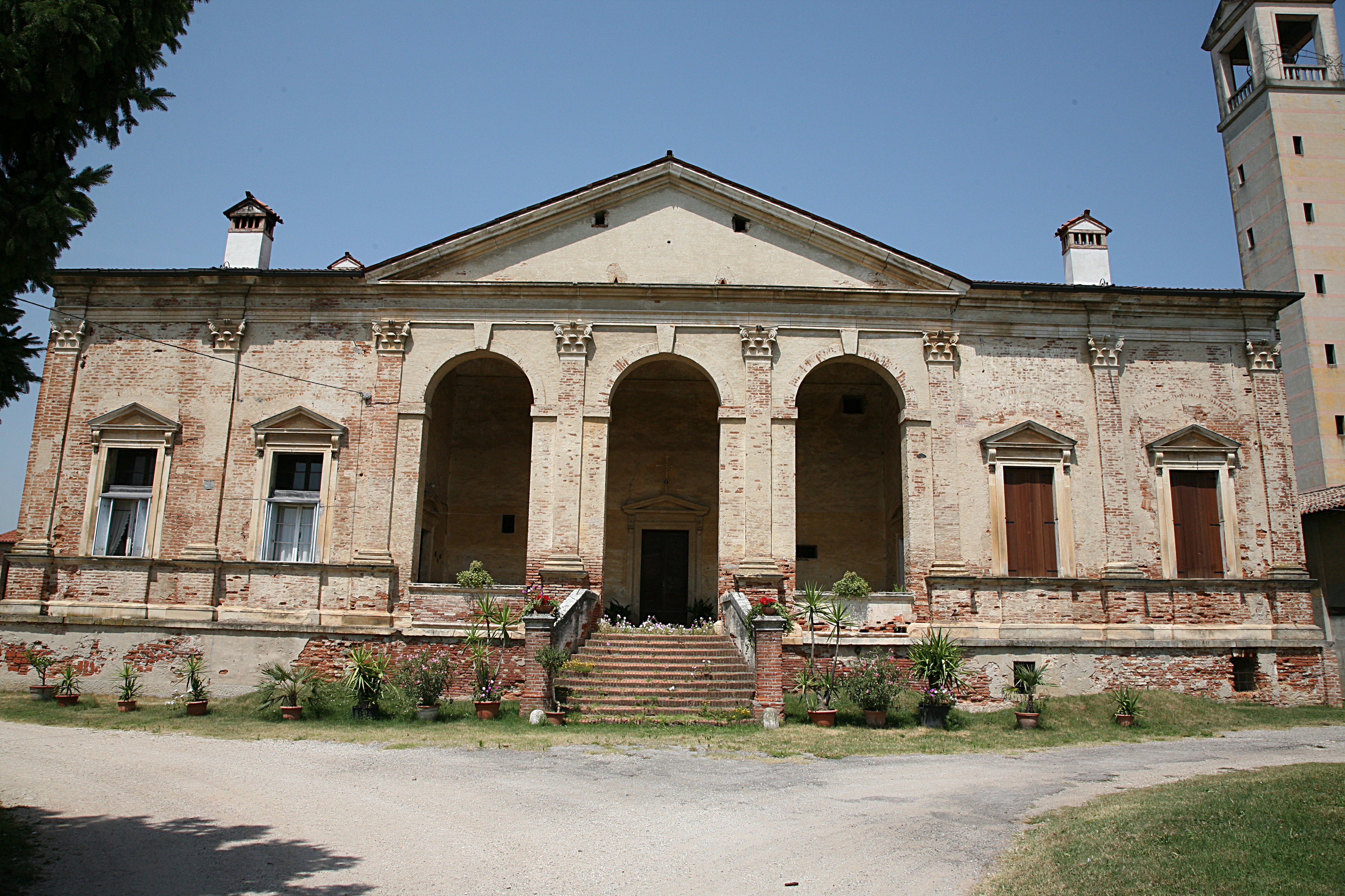 Villa Gazzotti in Bertesina near Vicenza by Andrea Palladio